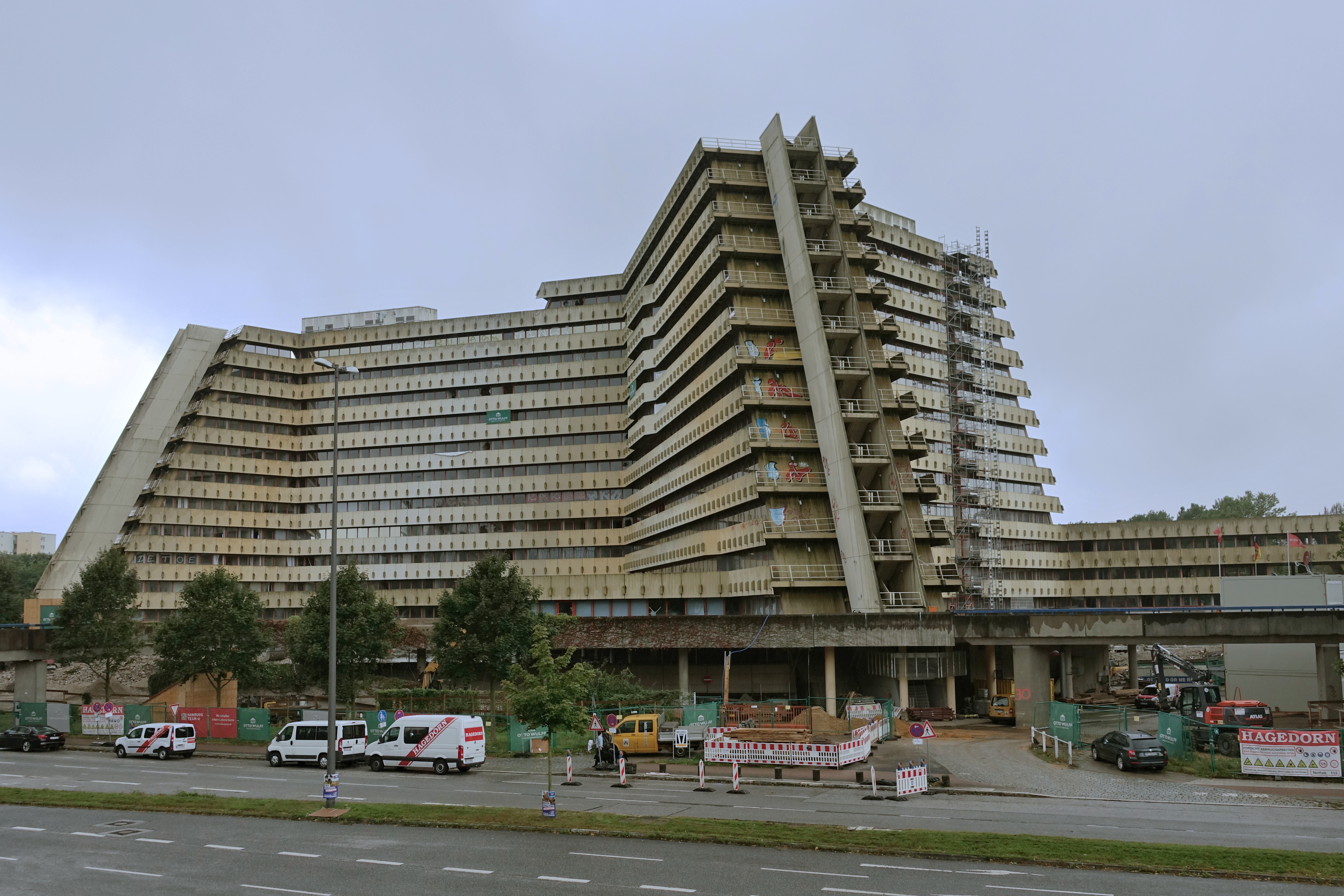 Ehemalige Oberpostdirektion (Überseering 30) während der Abrissarbeiten September 2017This is a photograph of an architectural monument.